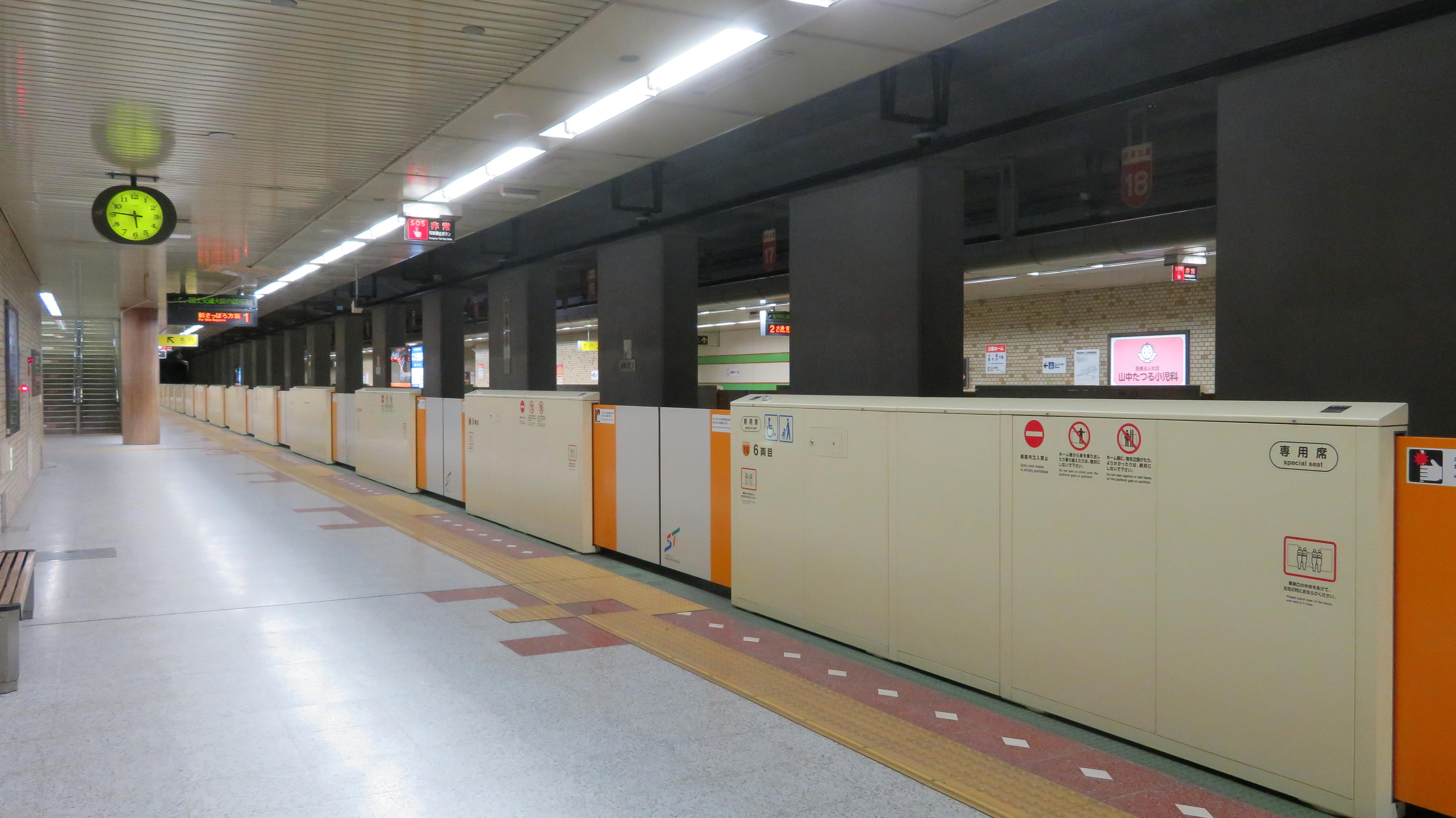 南郷13丁目駅ホーム Canon PowerShot SX720 HS